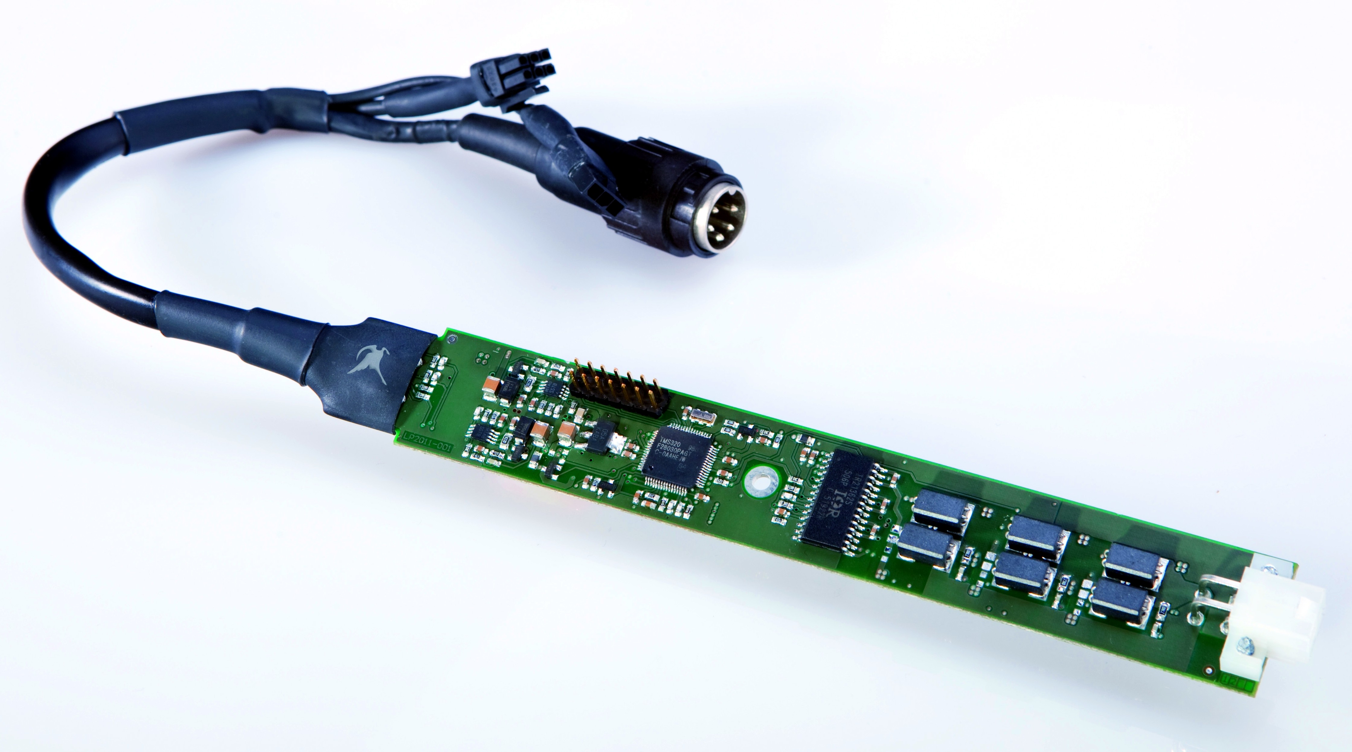 Elektronische Steuerung (in der Sattelstütze verbaut) vivax assist / Gruber Assist